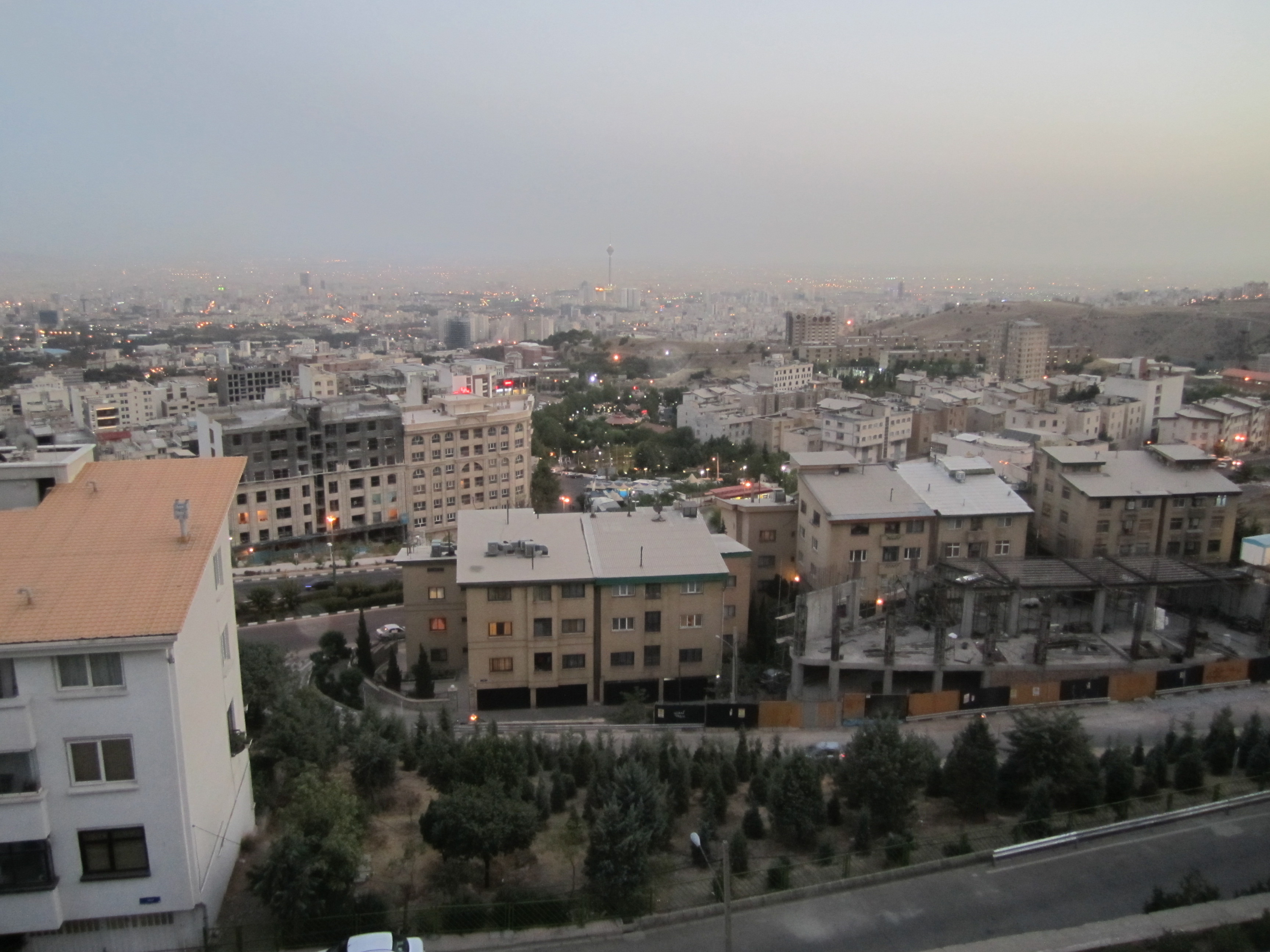 تهران در غروب